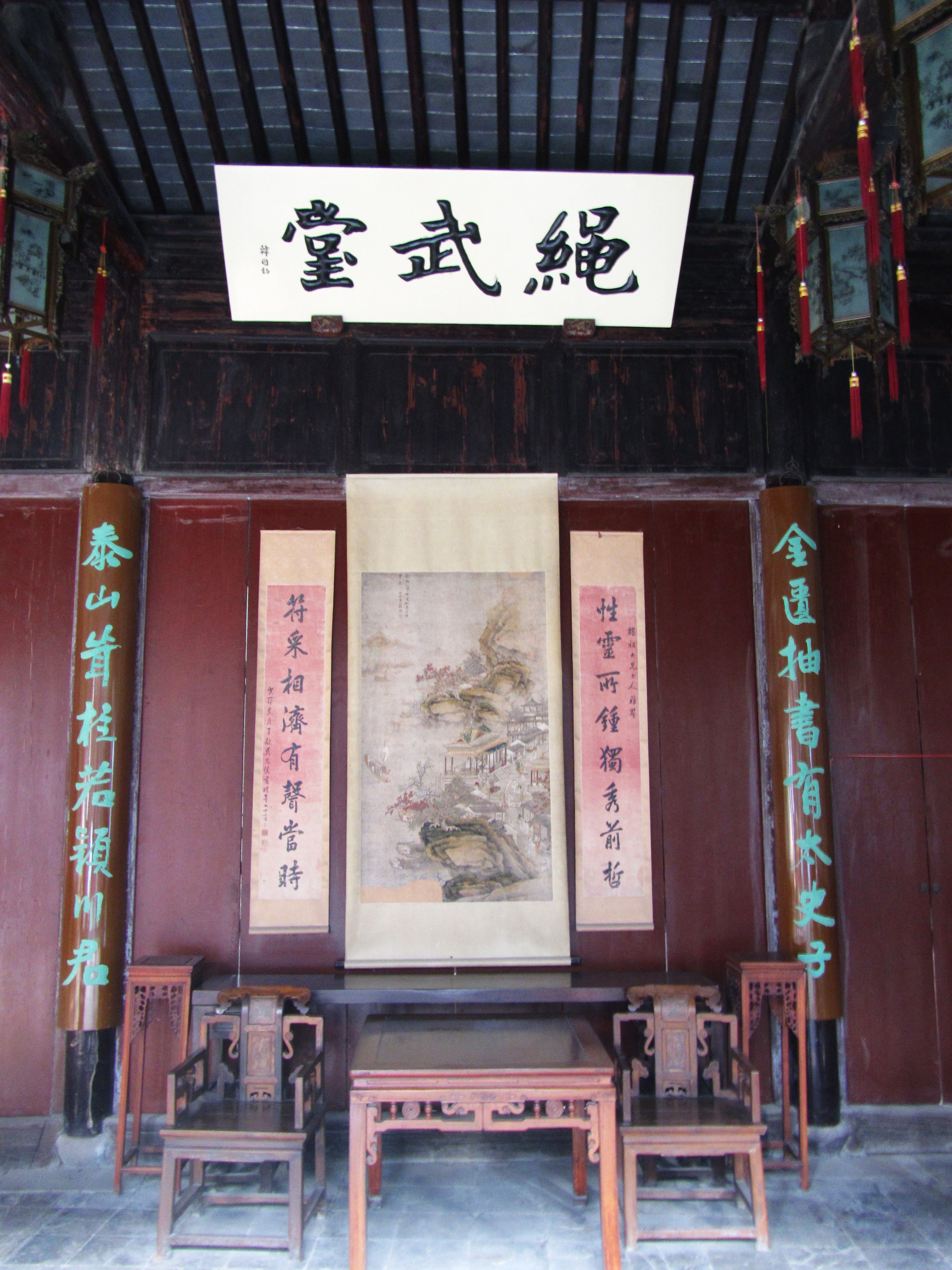 无锡市钱钟书故居内主体建筑绳武堂。